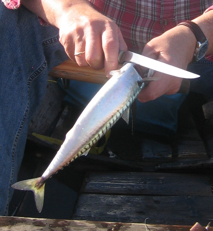 Bløgging av ein makrell